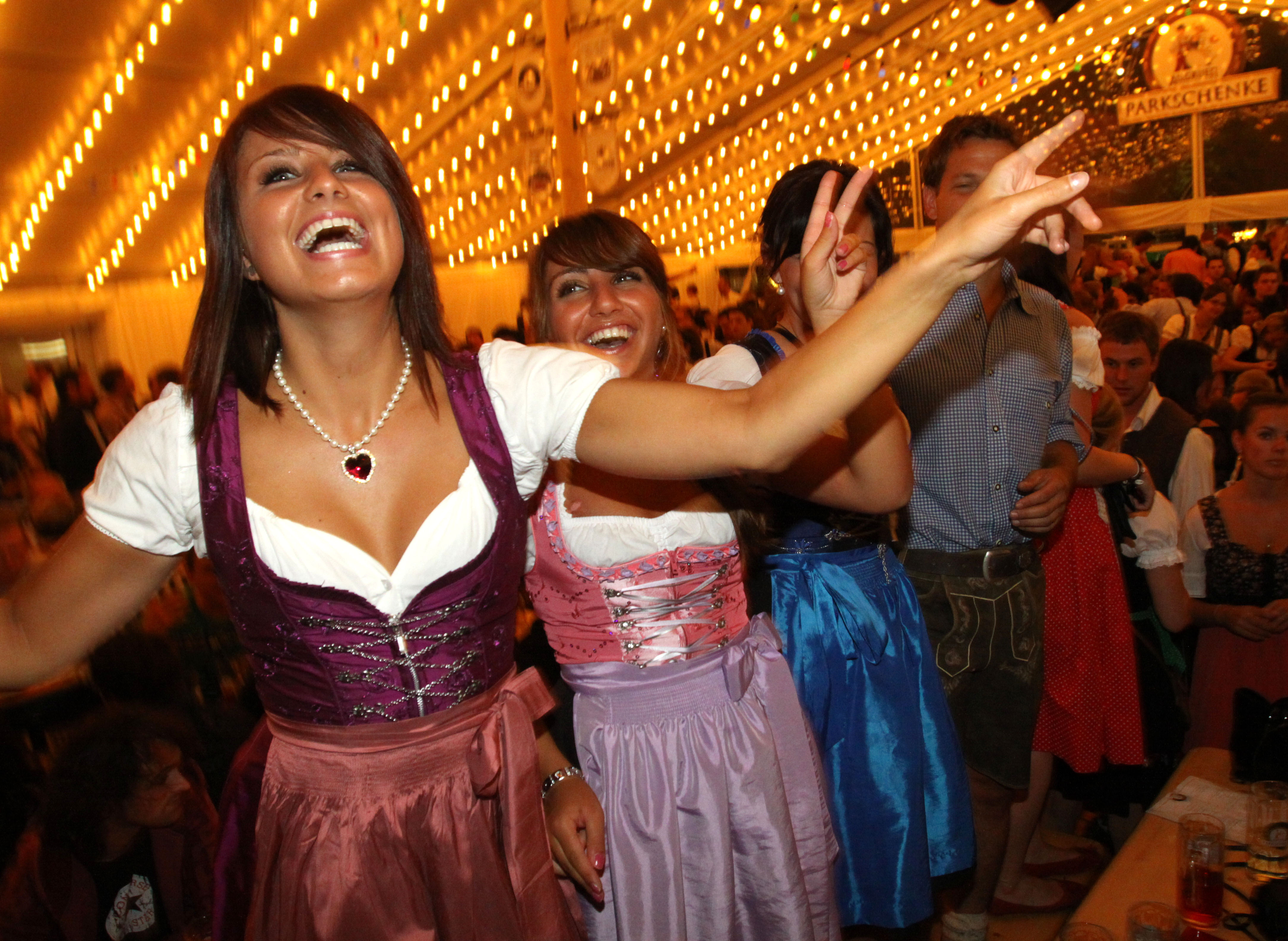 Allgäuer Festwoche Kempten